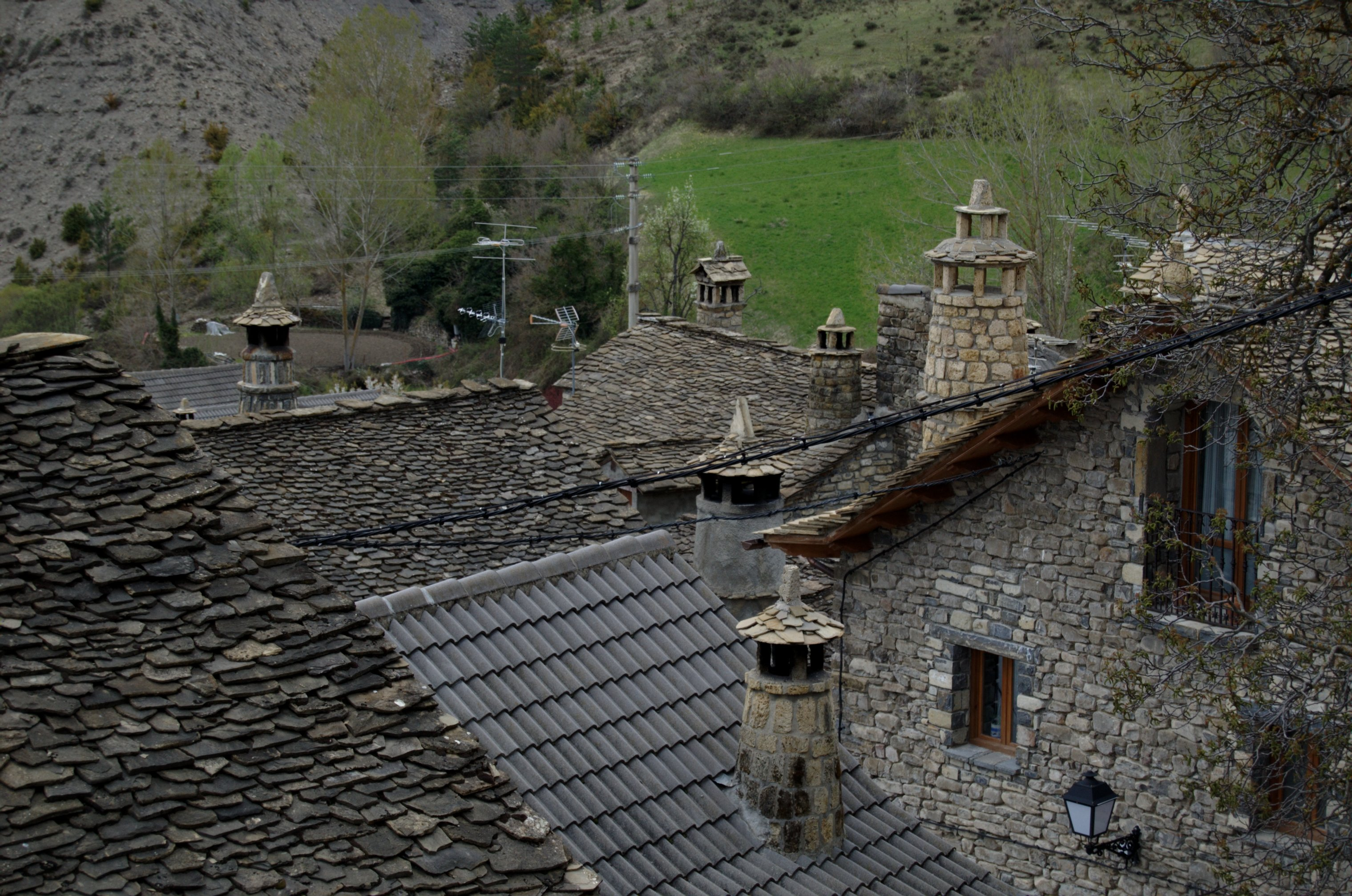 Tejados y chimeneas tradicionales en la Villa de Borau